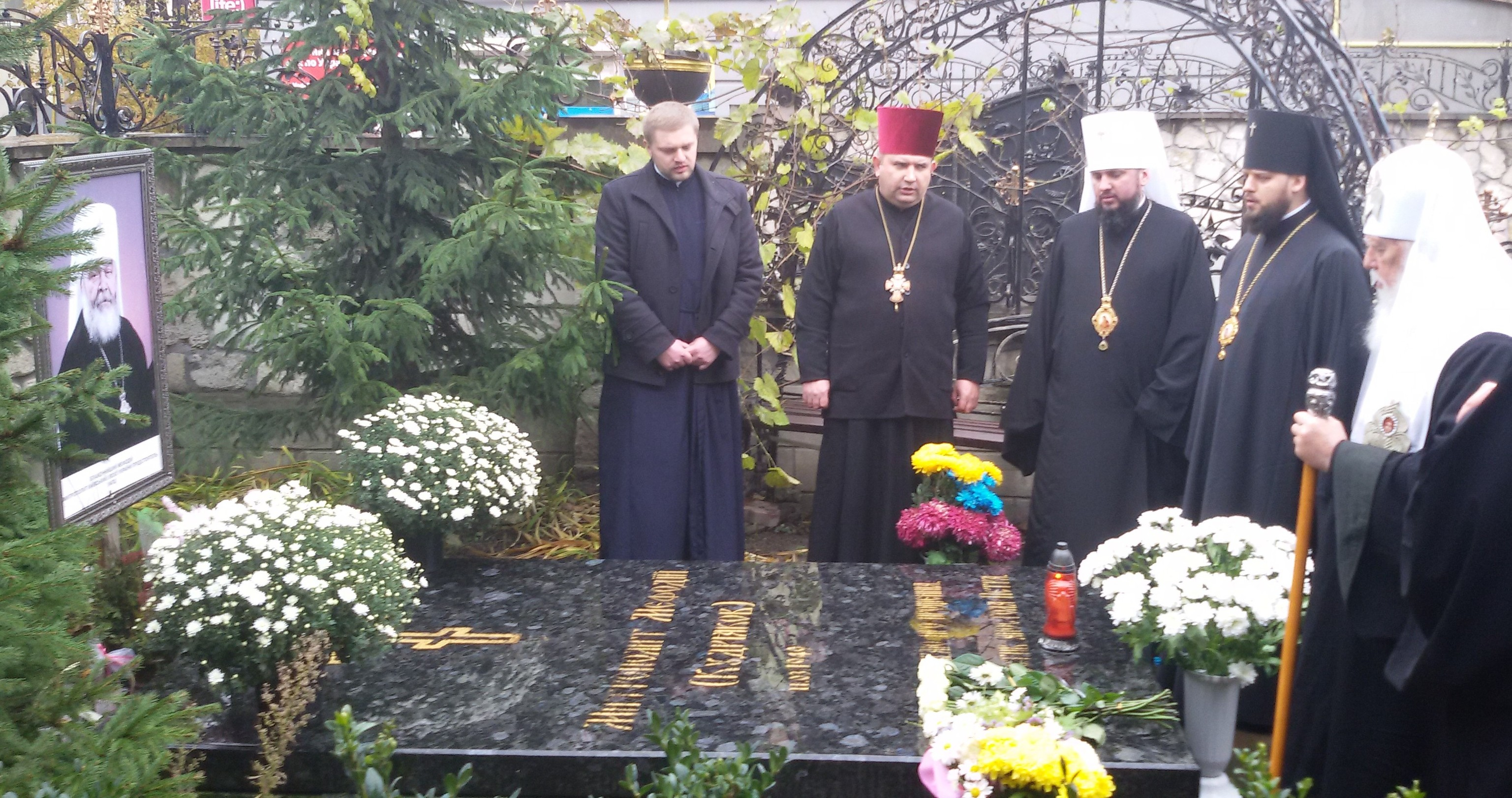 Патріарх Філарет під час молитви за спокій душі Митрополита Мефодія